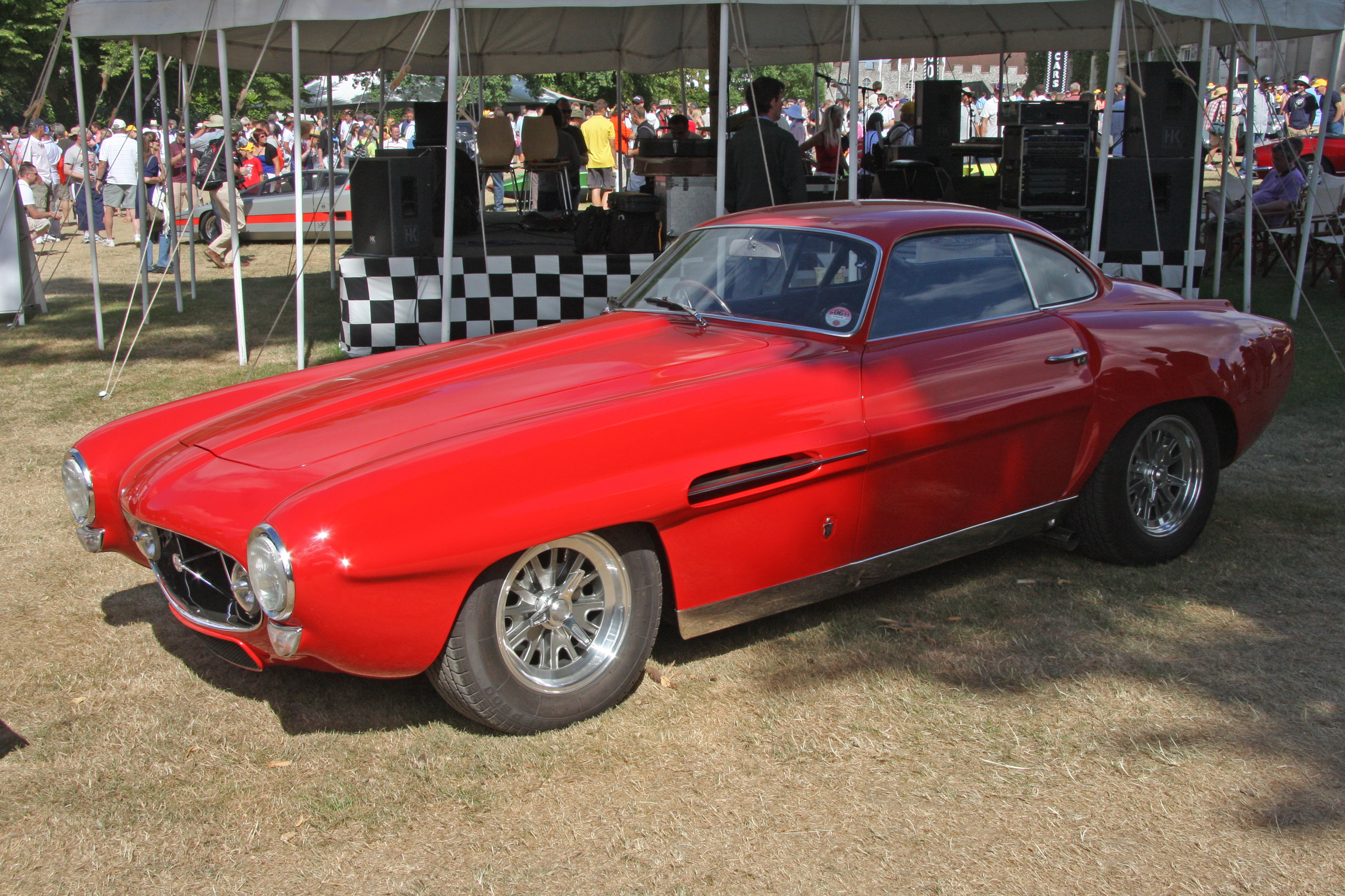 1965 Willment Cobra